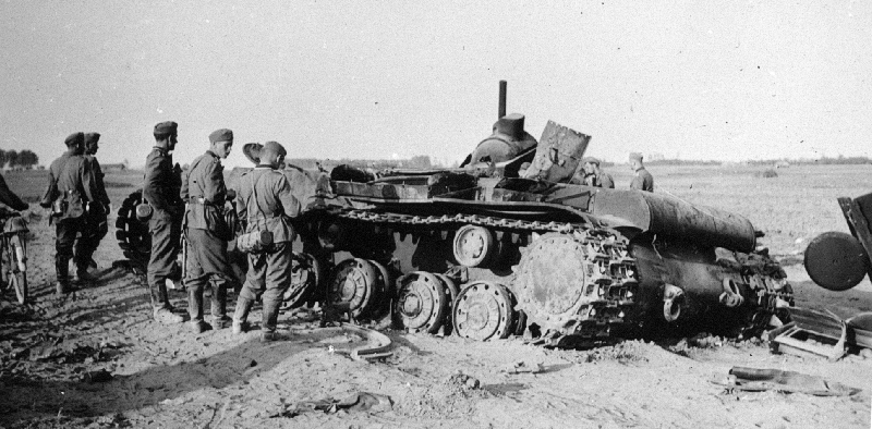 Zerstörter russischer Panzer KW-1 nach den Kämpfen bei Kowno.